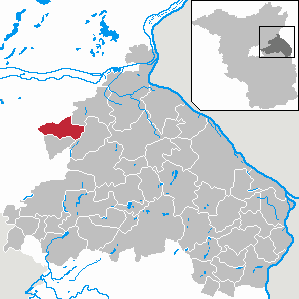 Heckelberg-Brunow in Brandenburg (Country) - District Märkisch-Oderland